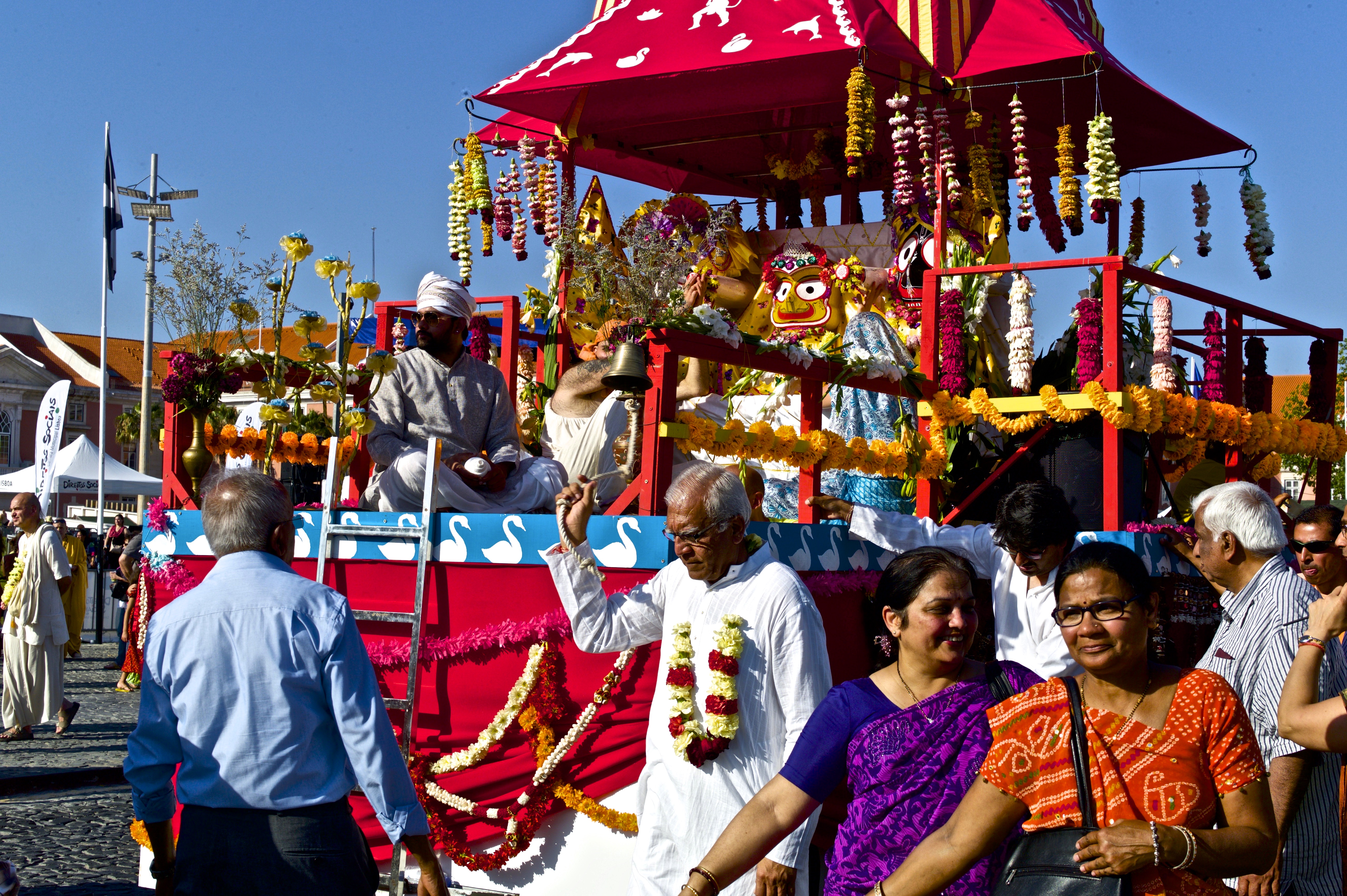 Lisbon Portugal 2016